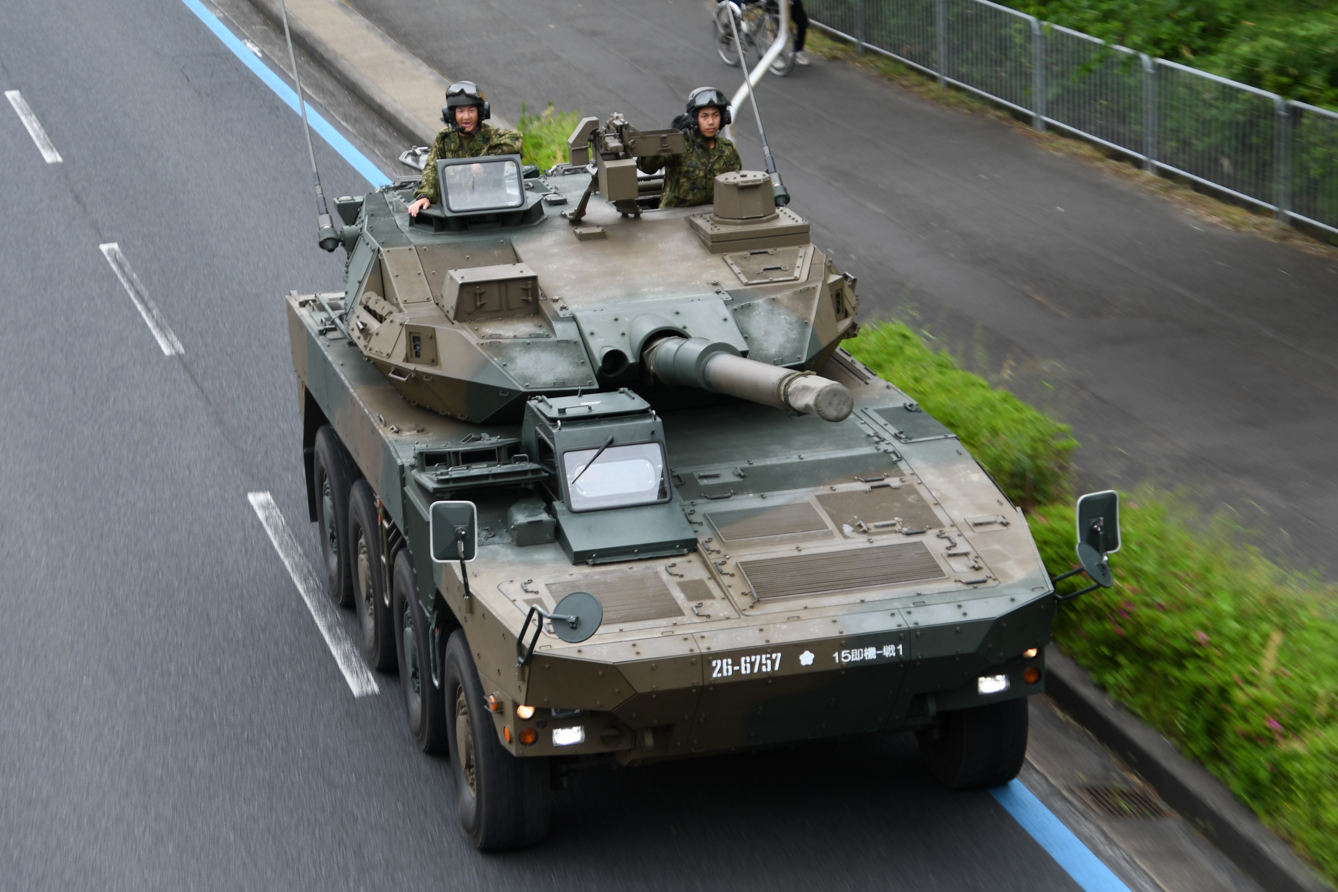 陸上自衛隊 16式機動戦闘車（26-6757号車） 右前面上部。2019年5月18日 海上自衛隊舞鶴基地にて。